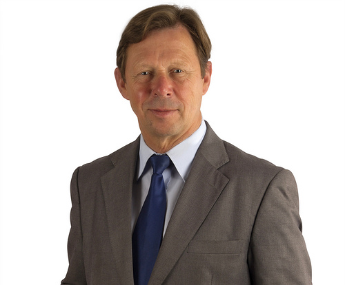 Jean-Marie TETART - 2012